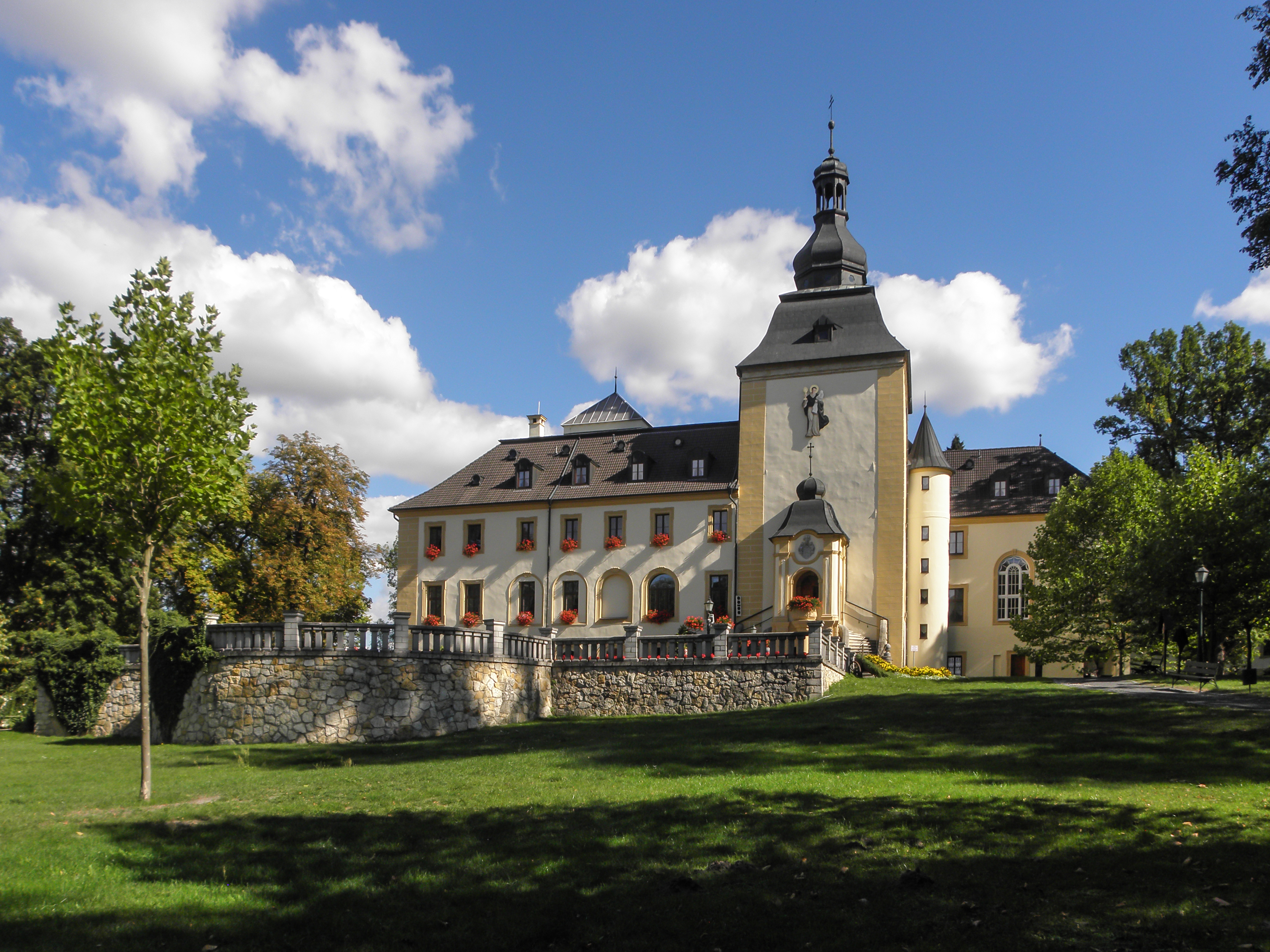 Kamień Śląski, pałac, XVII/XVIII, 2 poł. XIX